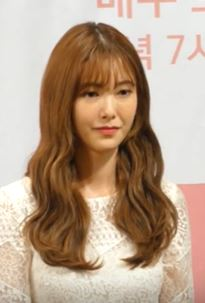 12일 오후 서울시 강남구 논현동 임피리얼팰리스 서울 호텔에서 KBS 새 주말드라마 '하나뿐인 내편'의 제작발표회가 열렸다.